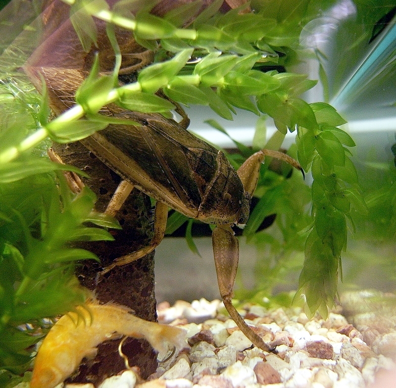 タガメ Species Lethocerus deyrollei Familia Belostomatidae